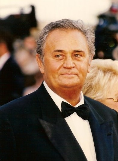 Roger Hanin au festival de Cannes.